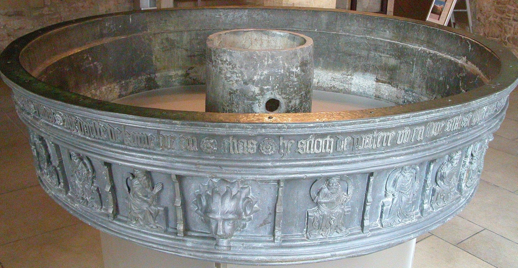 Braunschweig: Unterste Originalschale des Marienbrunnens im Städtischen Museum im Altstadtrathaus. Braunschweig, Germany: Lowest original bassin of St. Mary’s Fountain in the Municipal Museum in the Old Town Town hall.